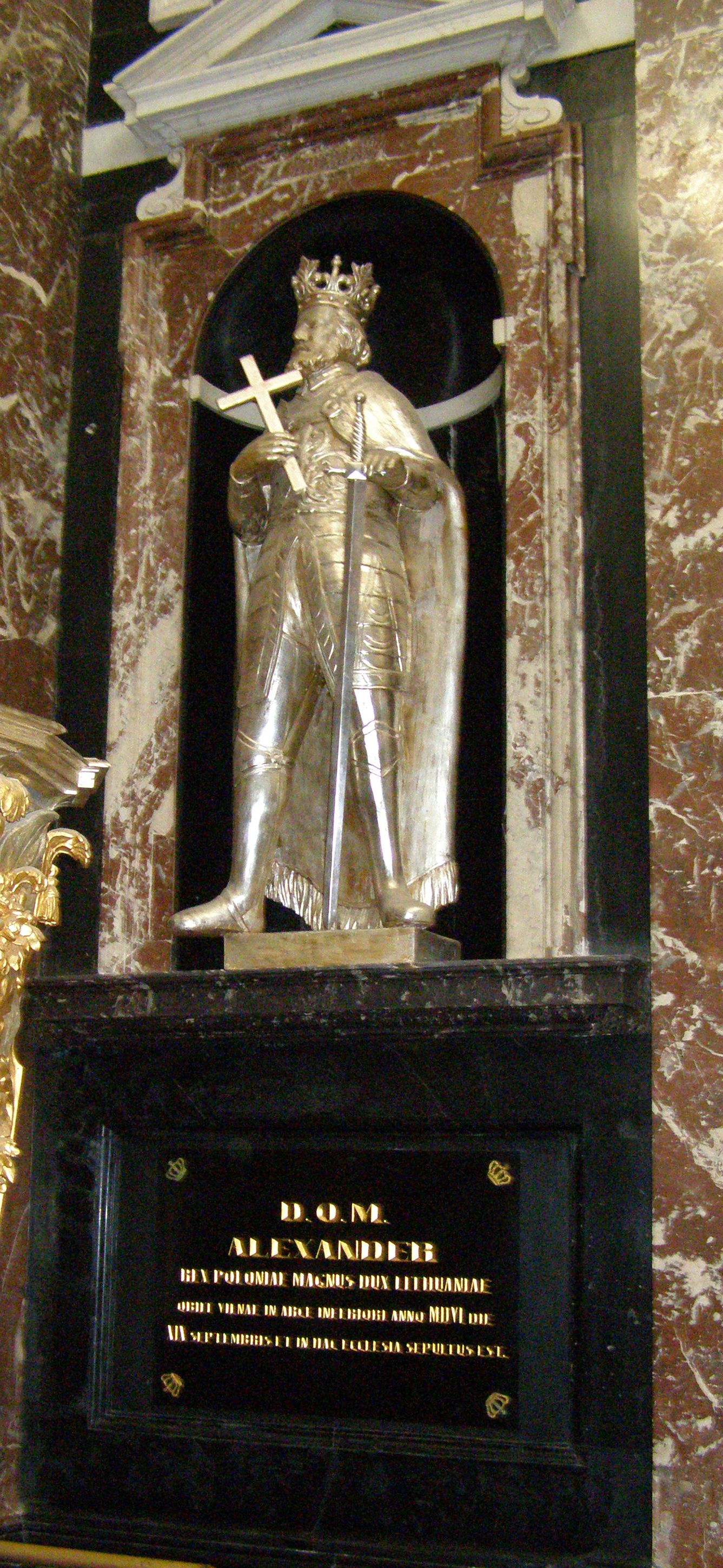 Epitafium Aleksandra Jagiellończyka w kaplicy katedry wileńskiej